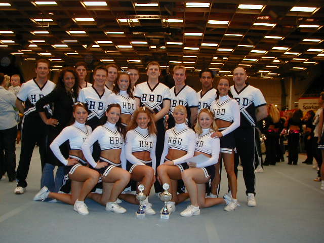 Hamburg Blue Angels, selbst fotografiert 2002 bei der Cheer-Meisterschaft in Leverkusen, GNU-FDL. Dieses Bild wurde mit meinem Einverständnis seinerzeit auch auf veröffentlicht, wobei das copyright mir gehört.